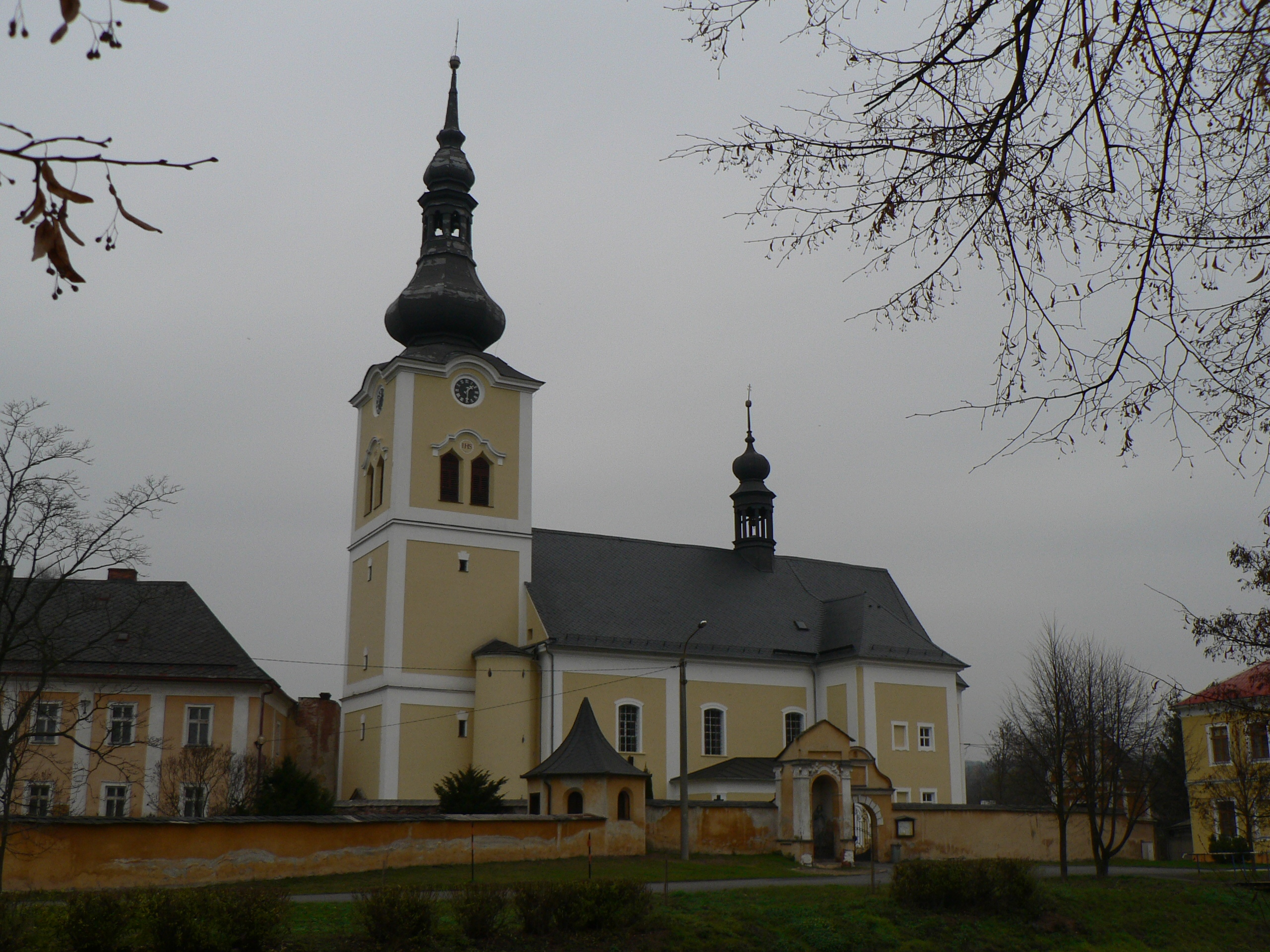 Kostel svatého Jiří (Moravičany)